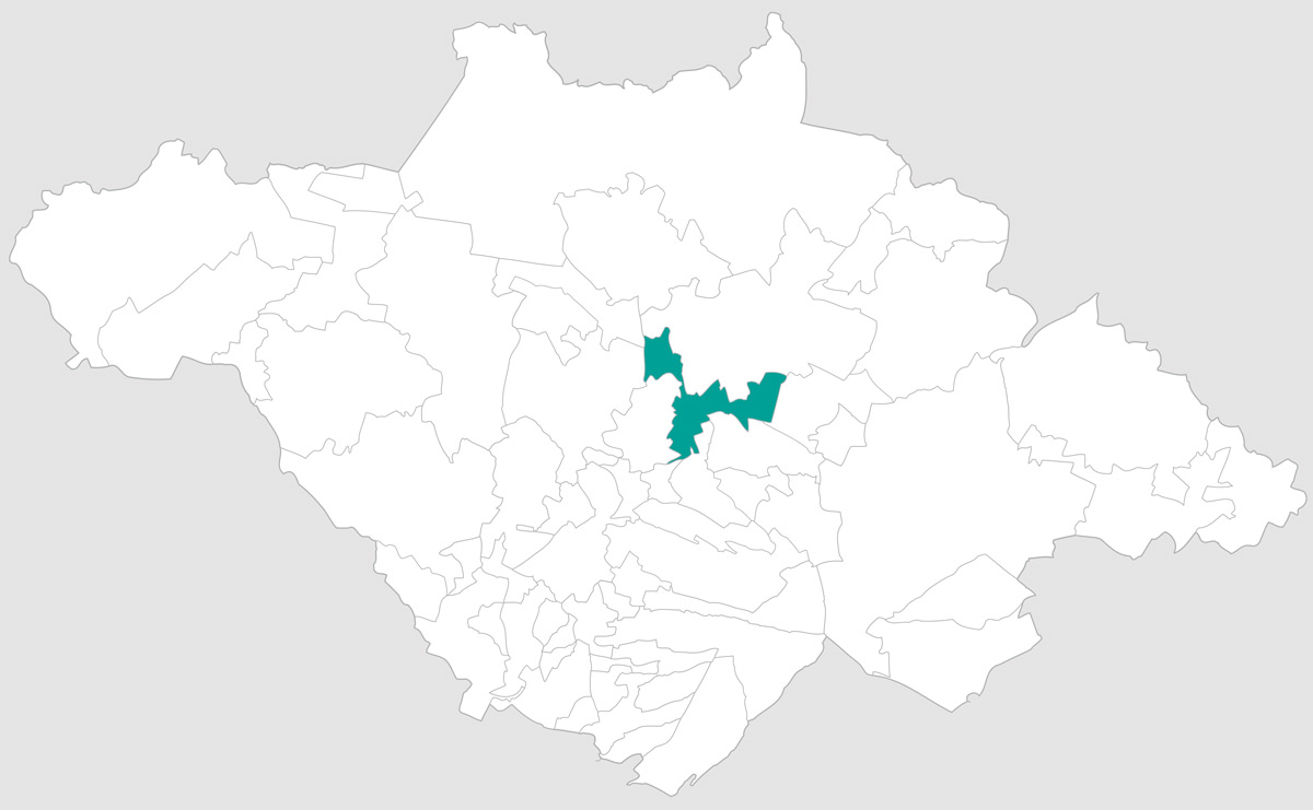 Mapa del Municipio de Apizaco